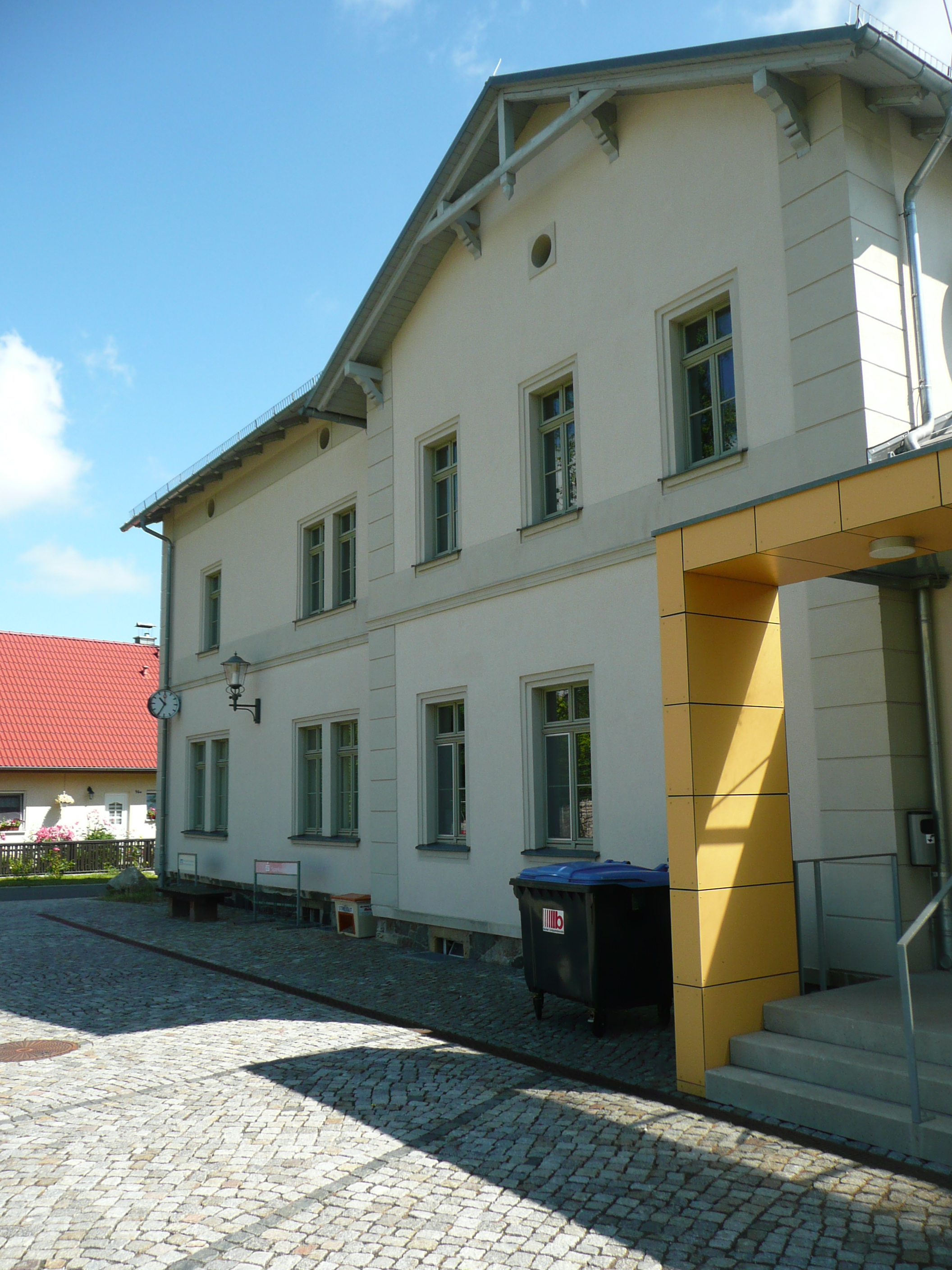 Mittelteil des Bahnhofes Wilsdruff